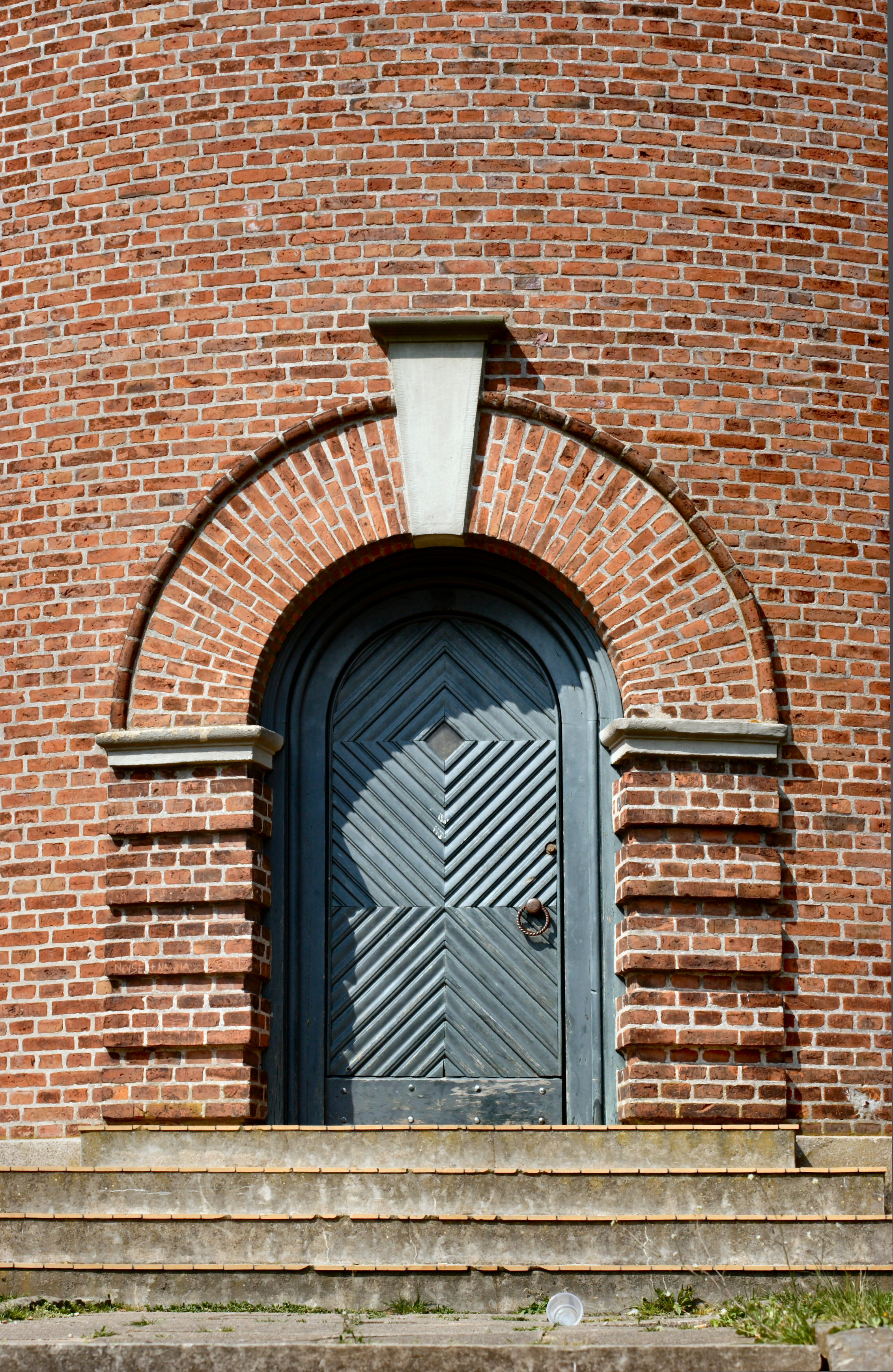 indgangsparti til Det Røde Vandtårn i Haderslev